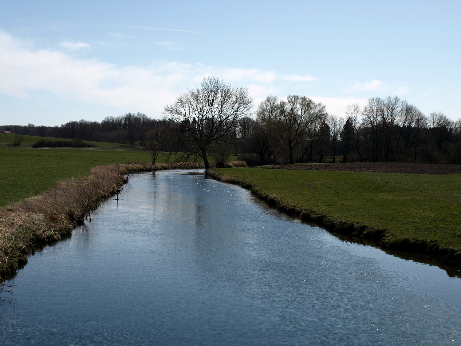 Sempt bei Erding; Stadtteil Aufhausen